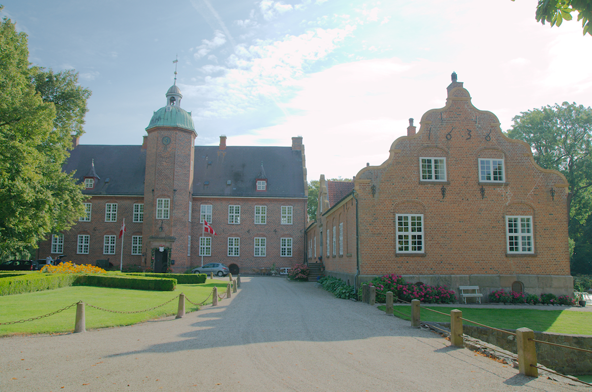 UlriksholmSlot 2012